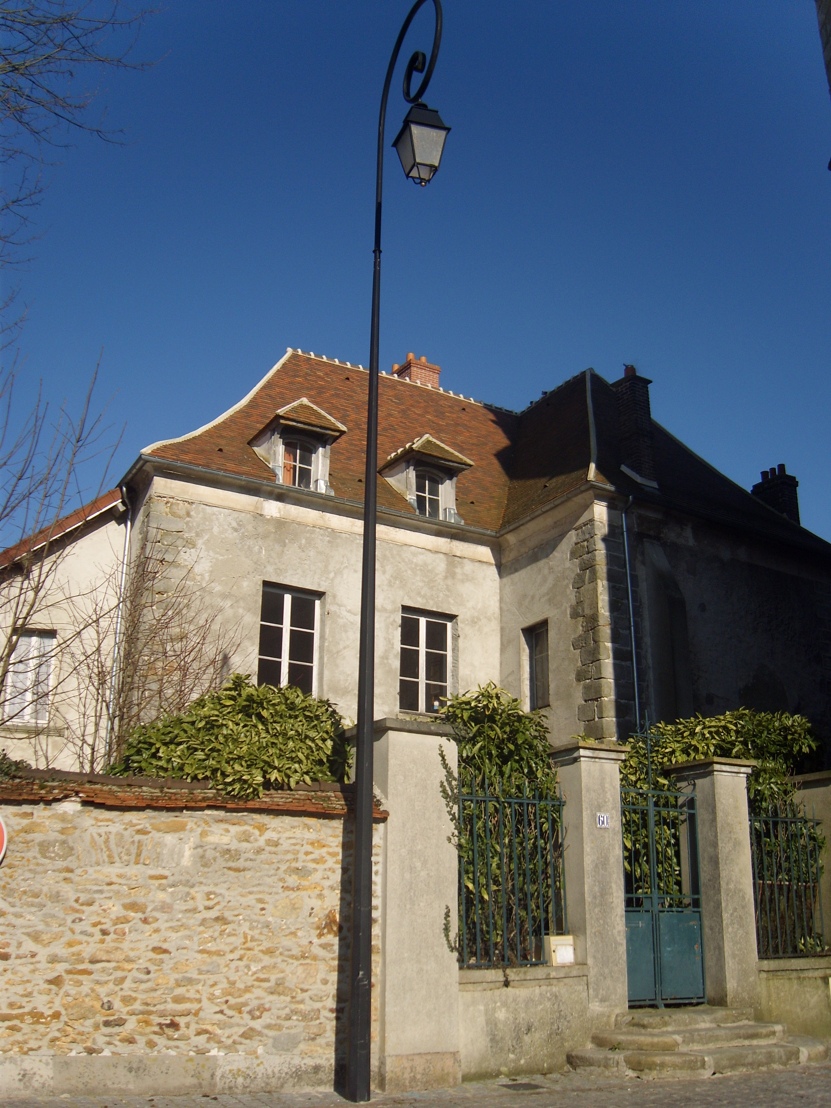 Le presbytère de Fontenay-Trésigny